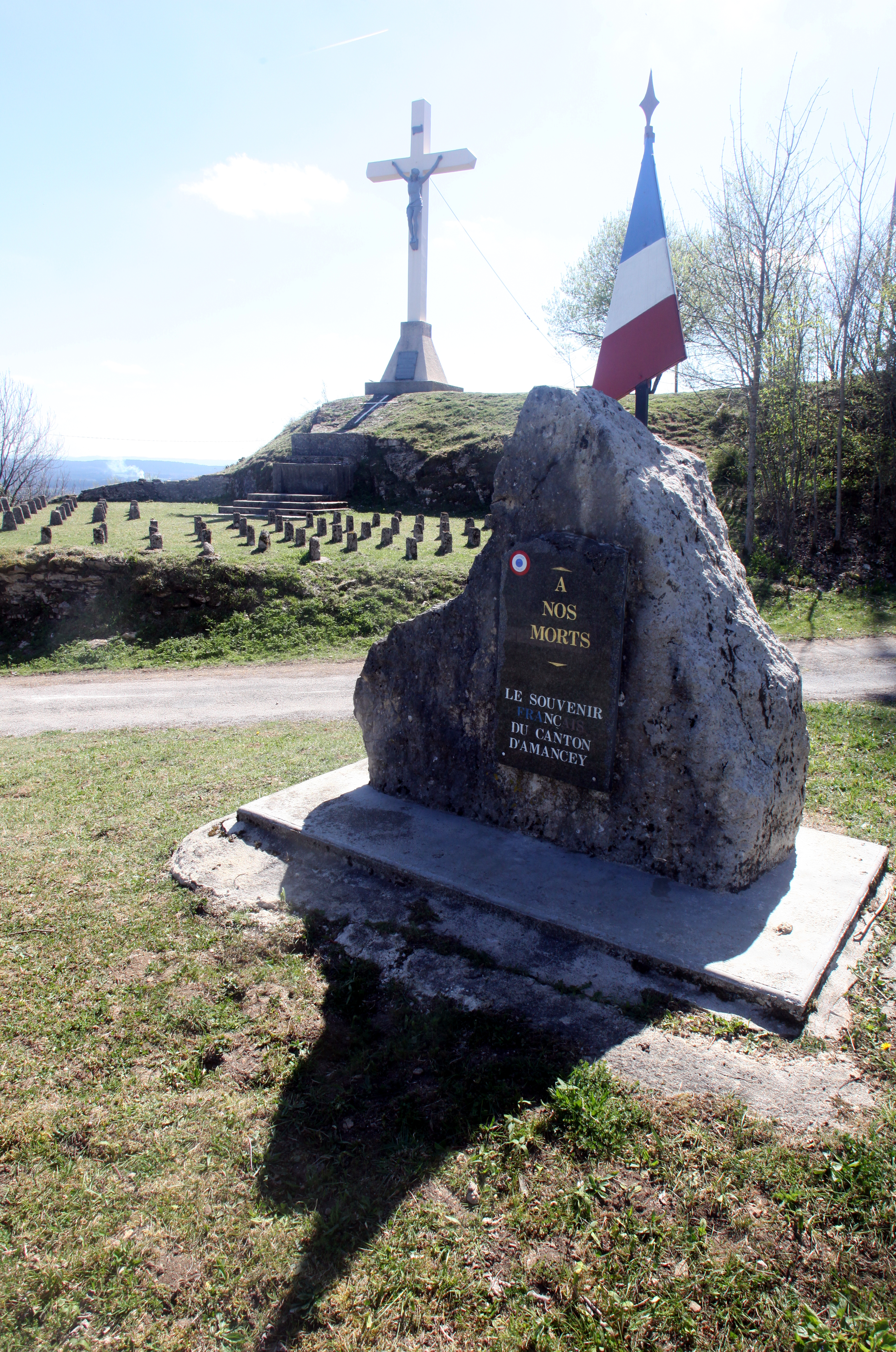 Monument au maquis sur la butte de Montmahoux (Doubs).